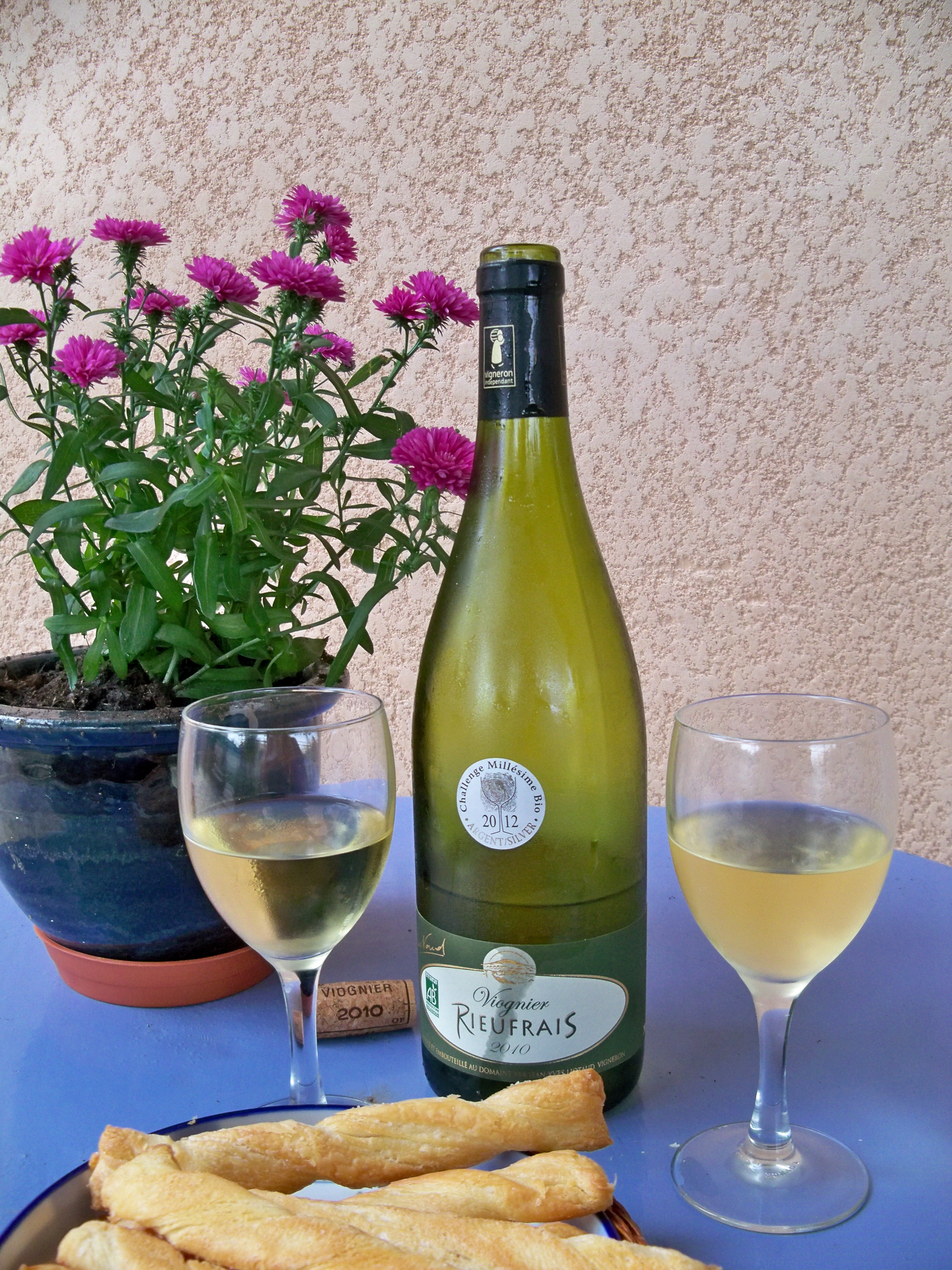 bouteille du domaine de Rieufrais blanc